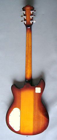 Ibanez_Studio_ST-100_electric_guitar_back